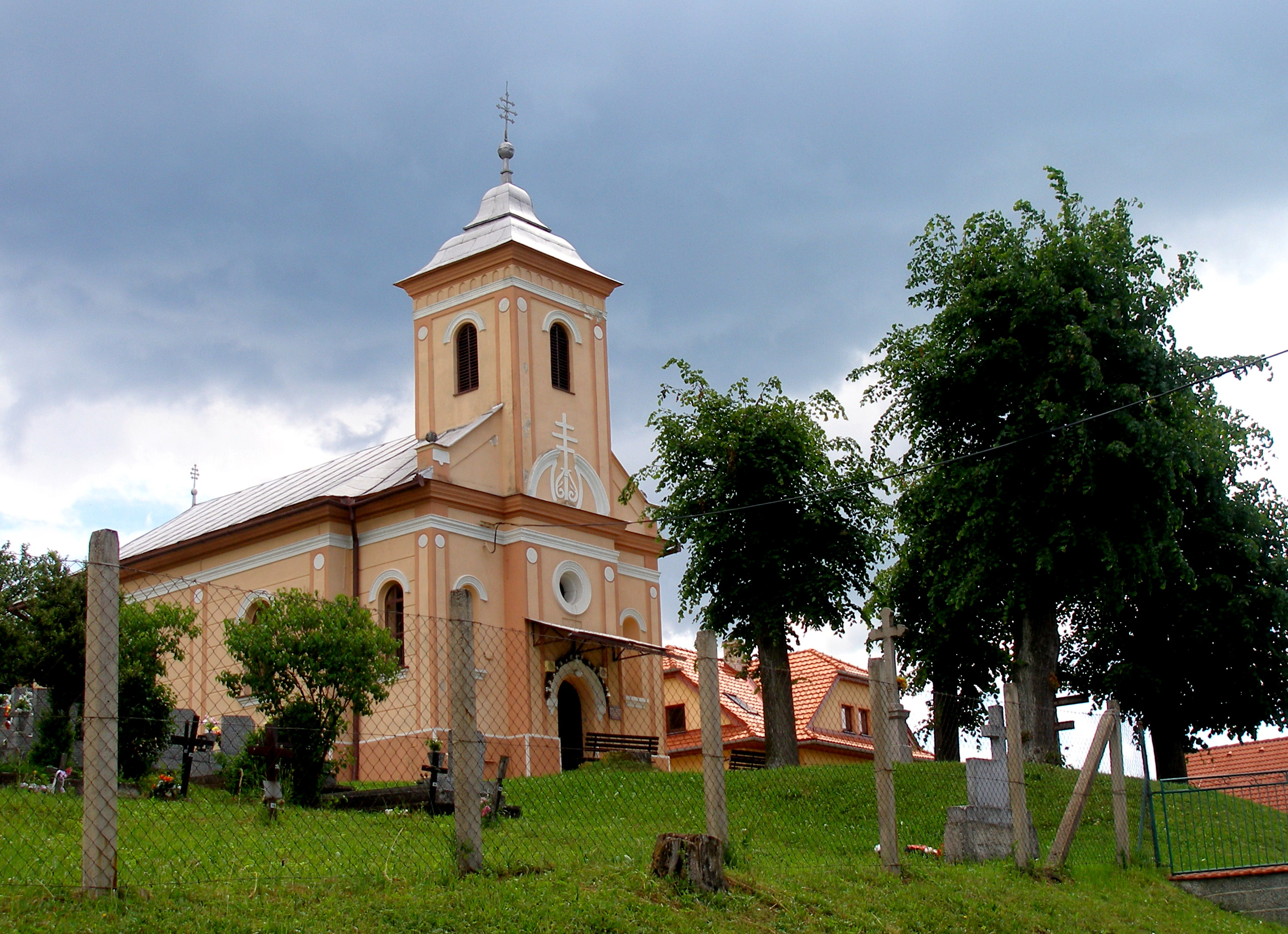 Kostol v obci Červená Voda okres Sabinov